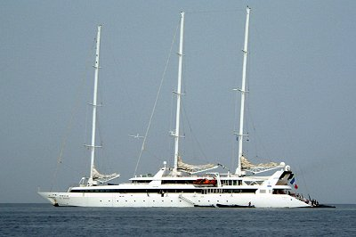 Le Ponant est un voilier de 88 mètres qui peut transporter 64 passagers pour des croisières de luxe IMO Number: 8914219 MMSI Number: 227186000 Callsign: FGZZ Length: 84 m Beam: 12 m